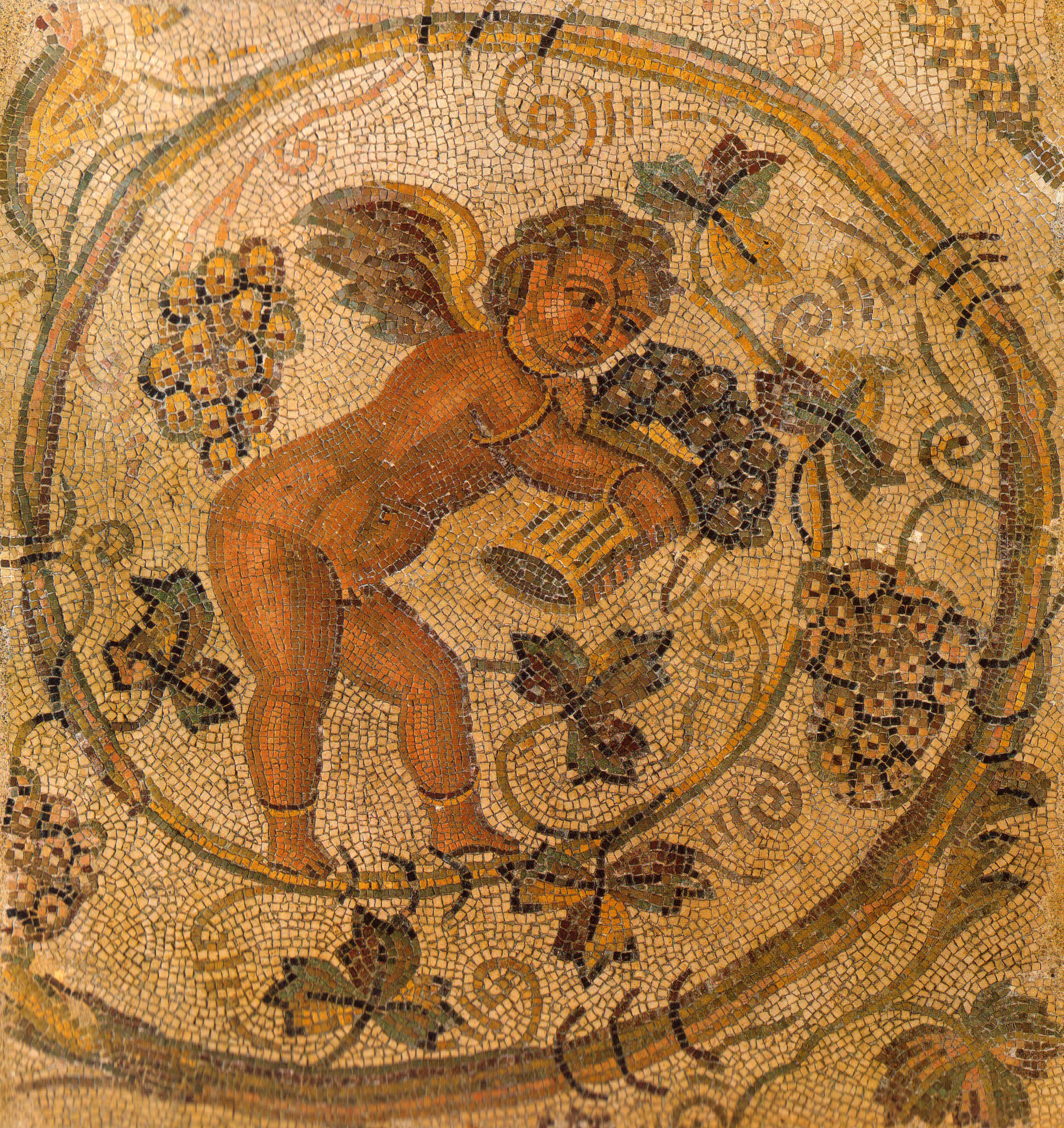 Carthage Amour vendangeur mosaïque du IVe s Musée du Louvre